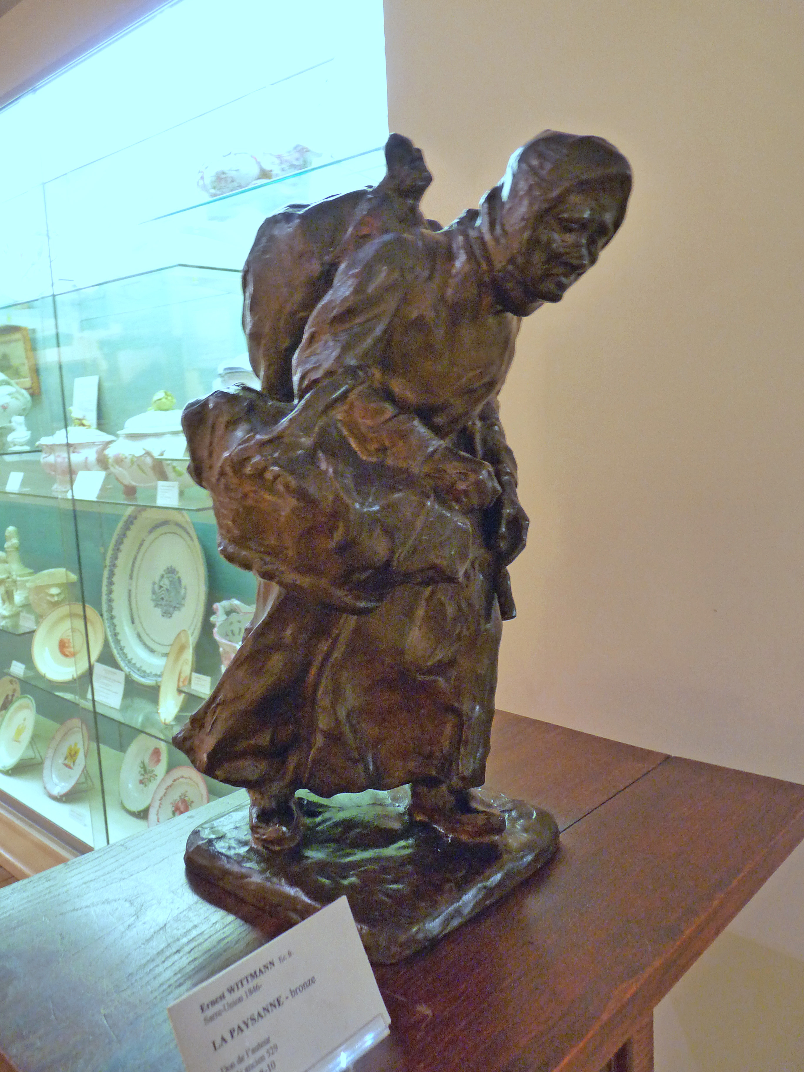 Ernest Wittmann (1846-1921), La paysanne, statuette en bronze. Musée Charles de Bruyères, Remiremont.